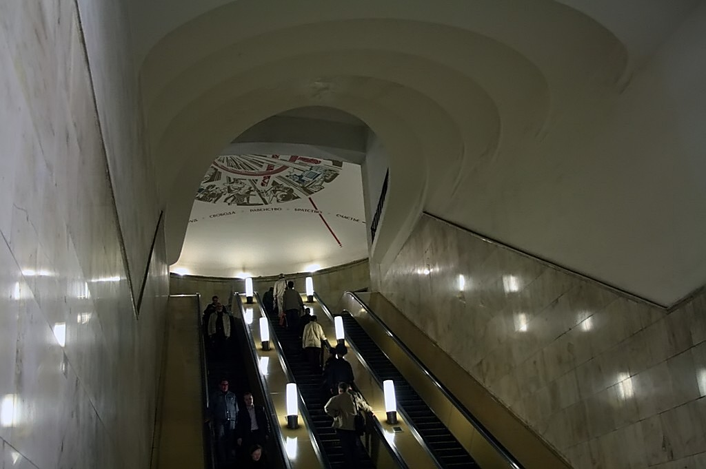 Станция Московского метрополитена Горьковско-Замоскворецкой линии «Автозаводская» (Москва и Московская область, Москва, Автозаводская улица)